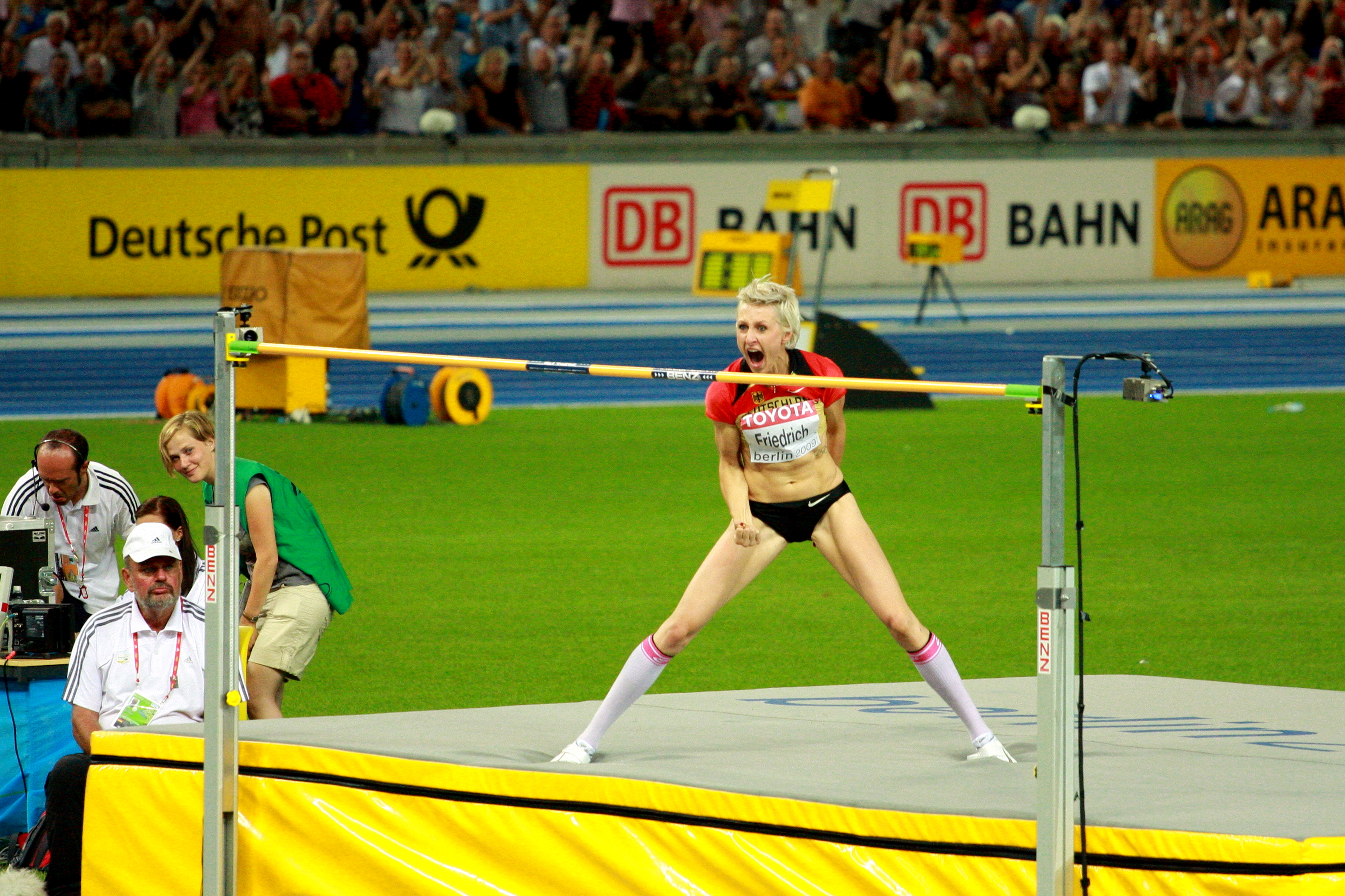 Bronze Medalist